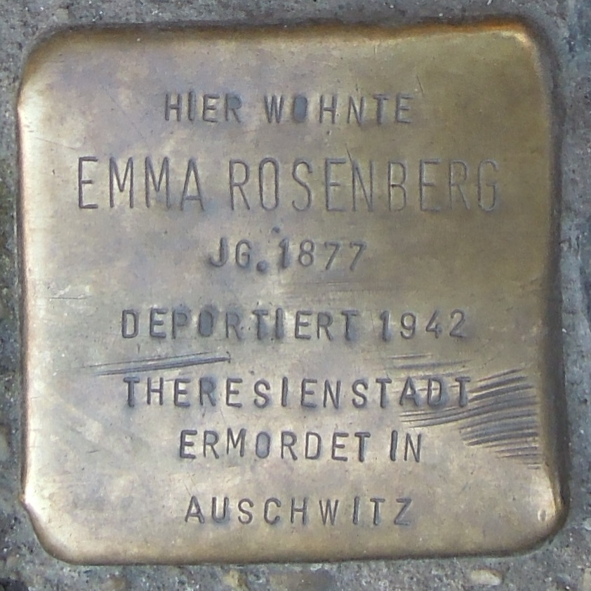 Stolperstein in Soest Brüderstraße 32, Emma Rosenberg